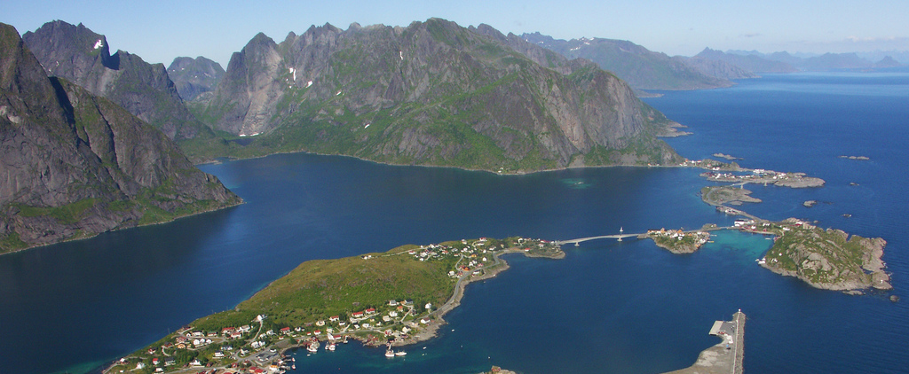 Reine sett frå Reinebringen